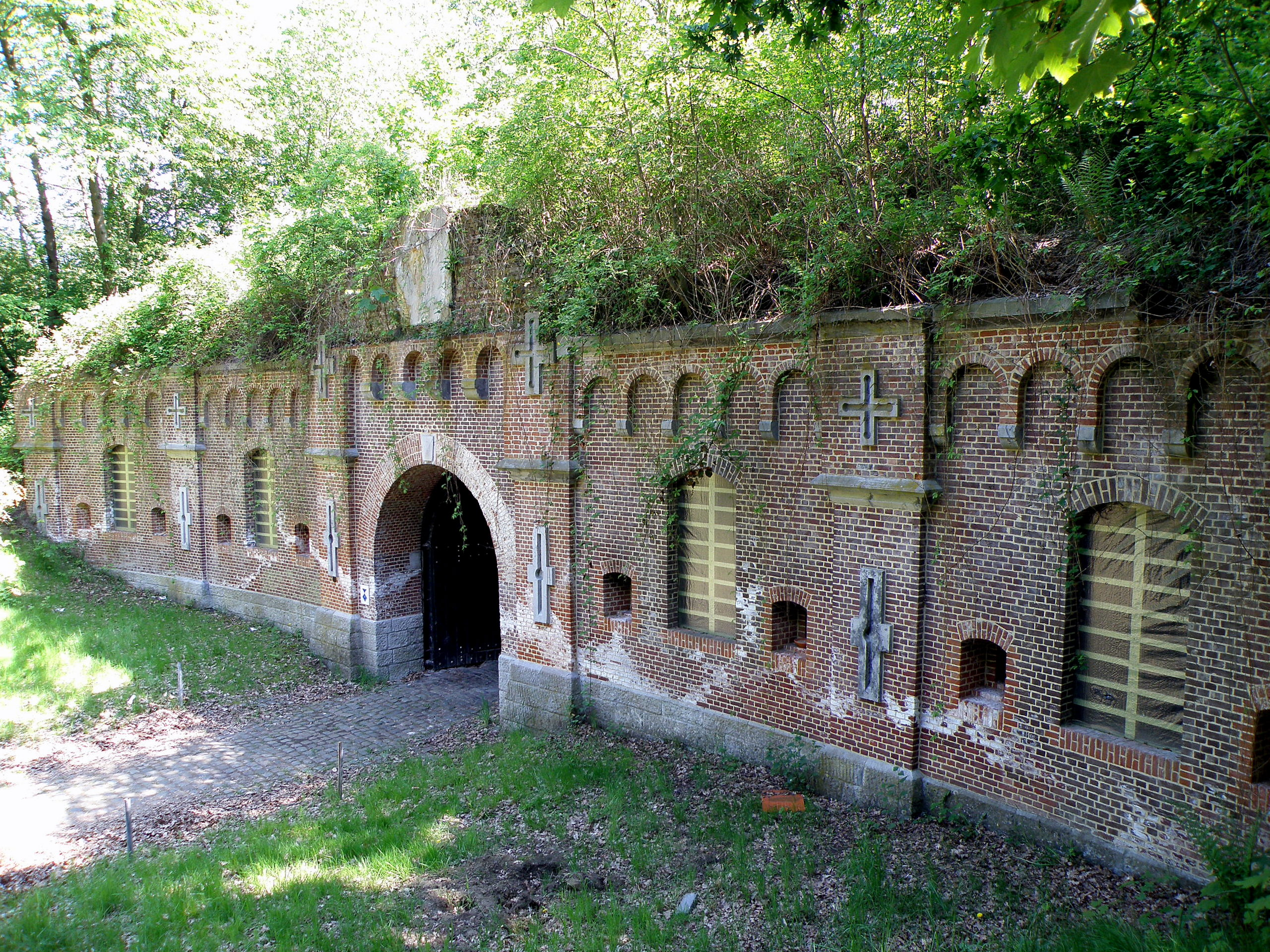 Antwerpen, district Hoboken. Fort VIII, deel uitmakend van Antwerpse Brialmont-fortengordel.